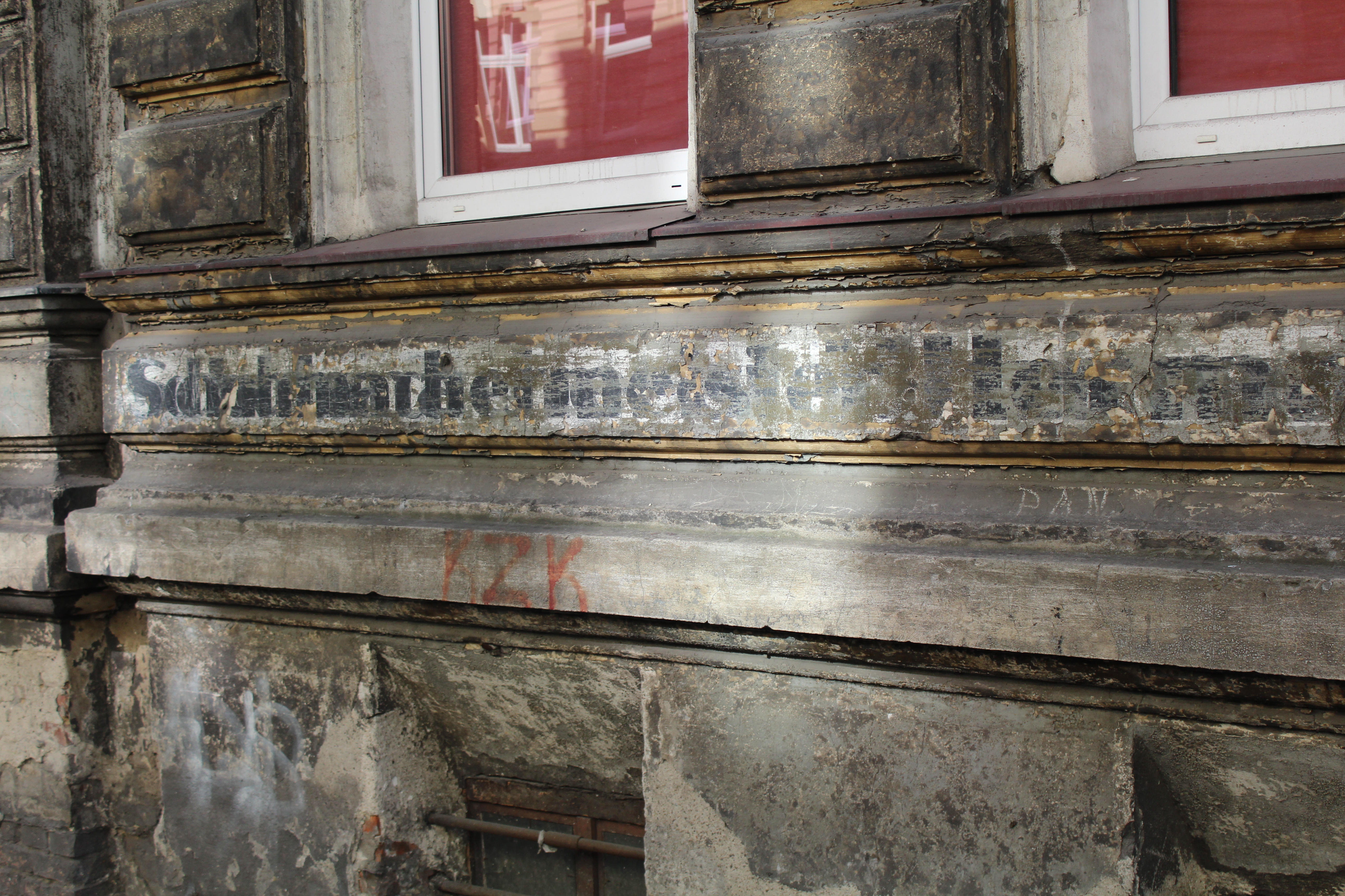 Przedwojenne napisy na ul. Małkowskiego w Szczecinie